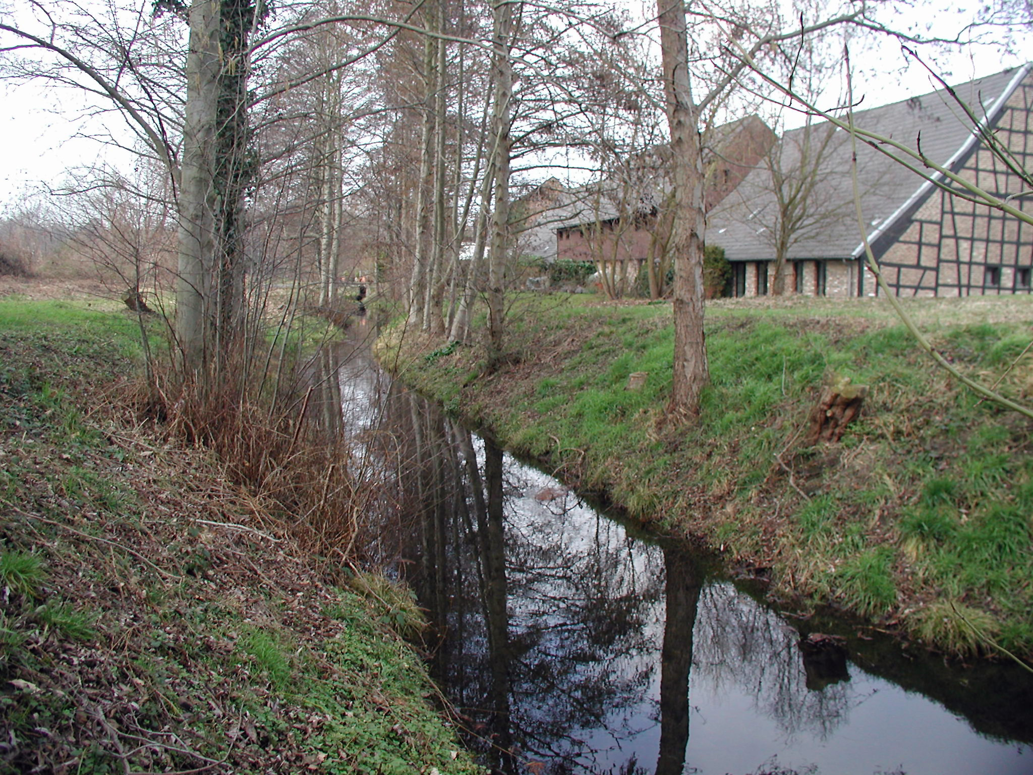 Palmersdorfer Hof, Brühl. Westseite